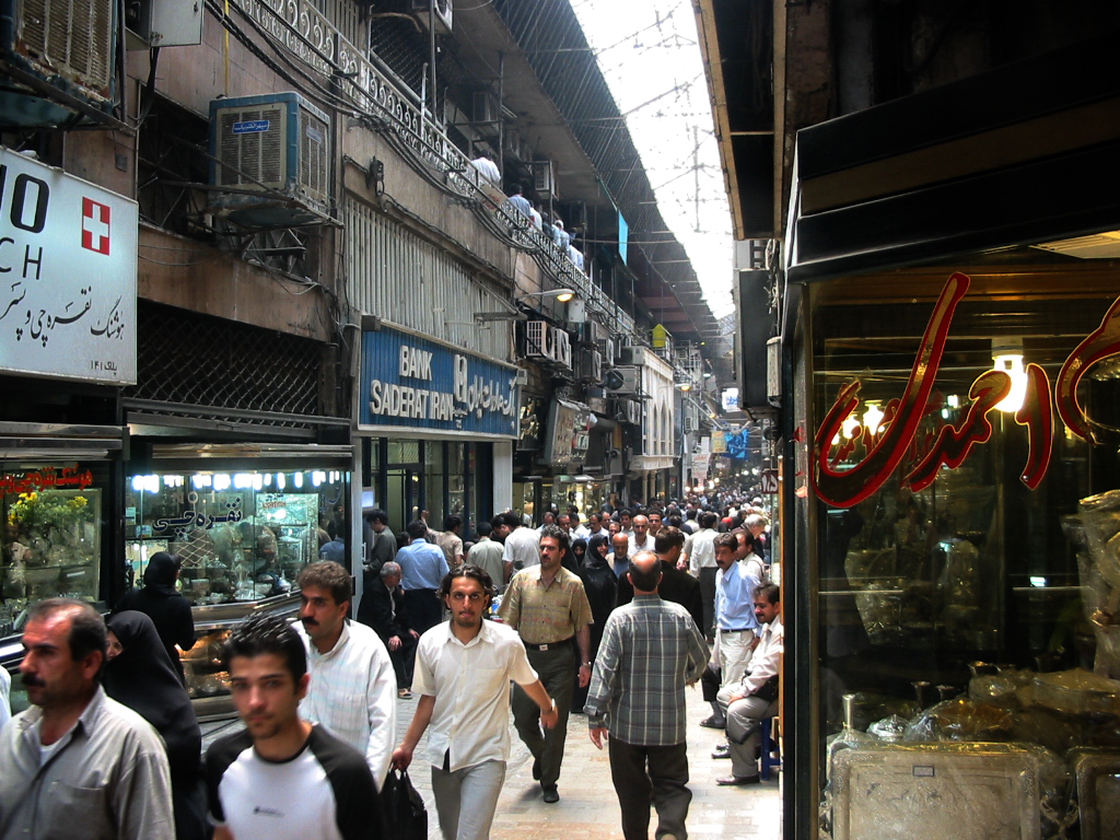 Grand Bazaar in Tehran, Iran